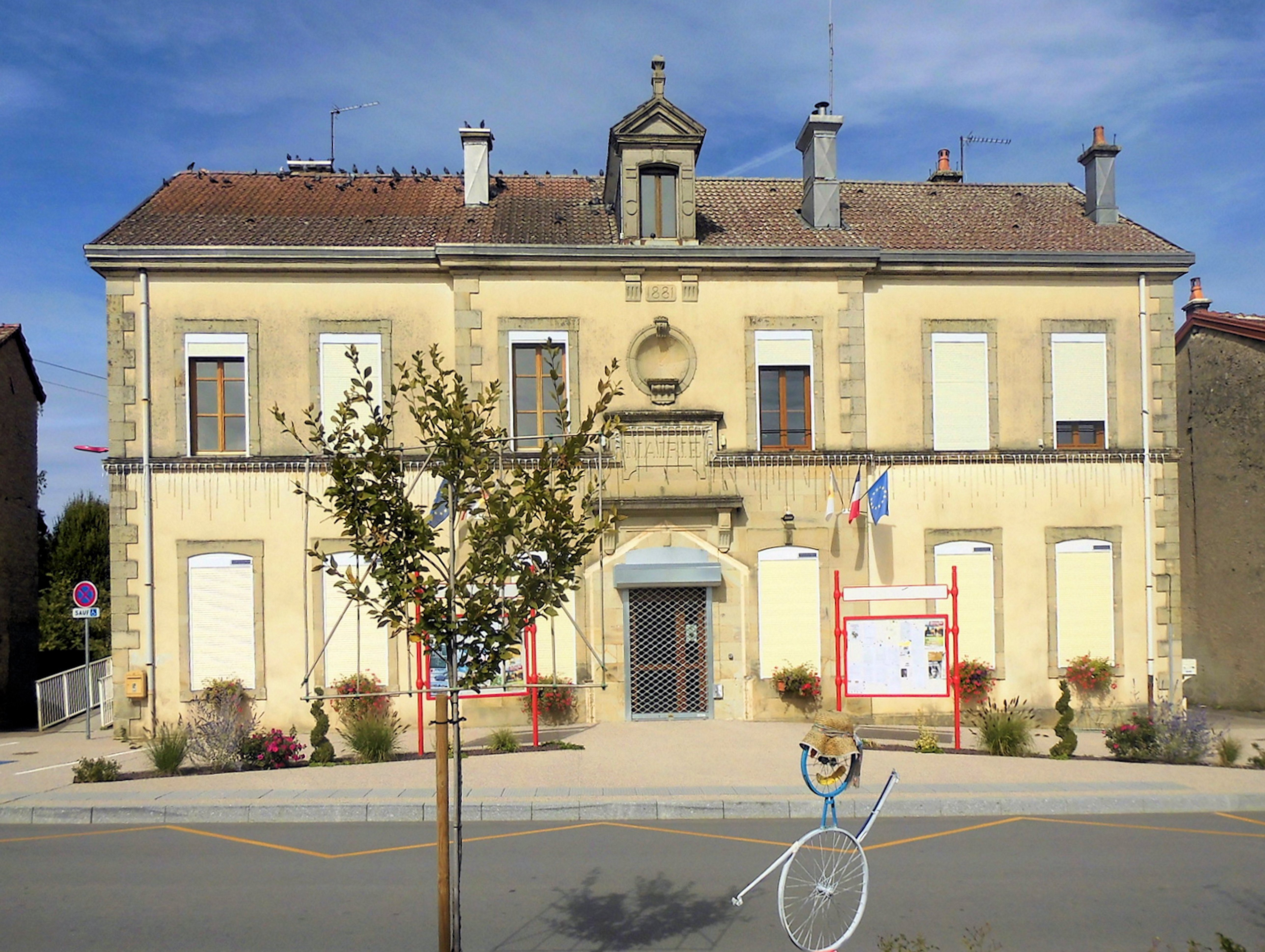 La mairie de Darnieulles